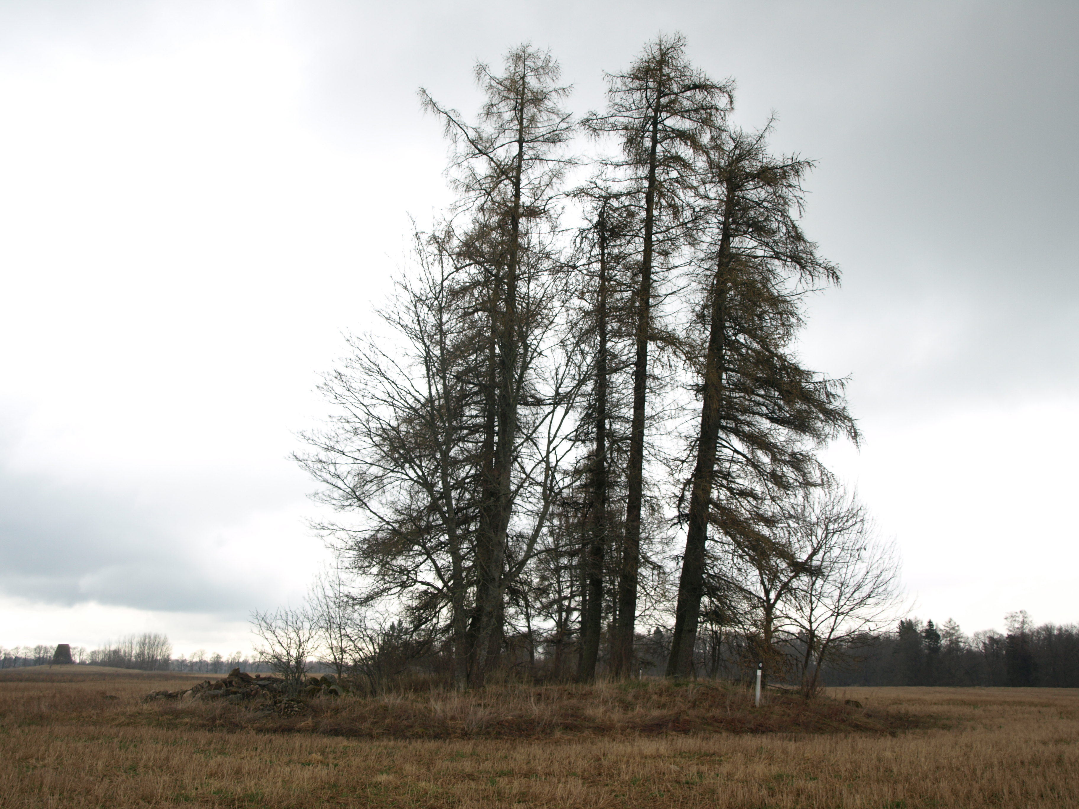 Kivikalme